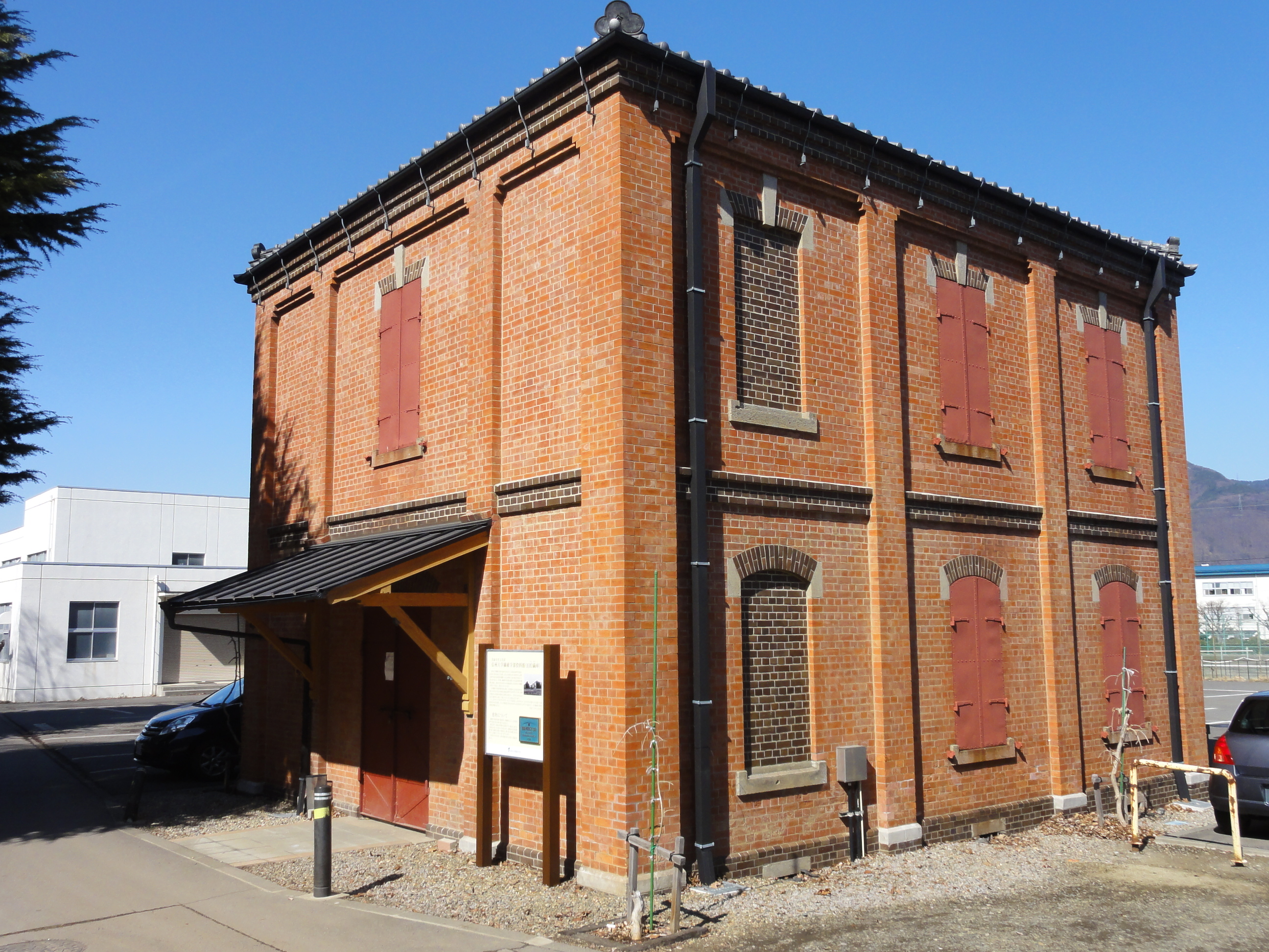 1910年に。繭の保管庫（貯繭庫）として建築され、現在は信州大学繊維学部資料館として利用されている。